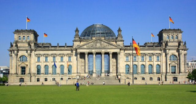 Frontalansicht des Bundestagsgebäudes.